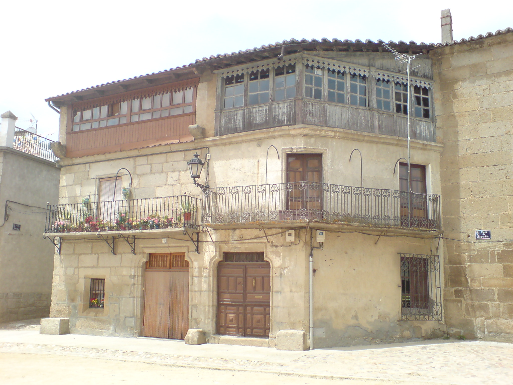 Arquitectura popular en San Felices de los Gallegos, San Felices de los Gallegos